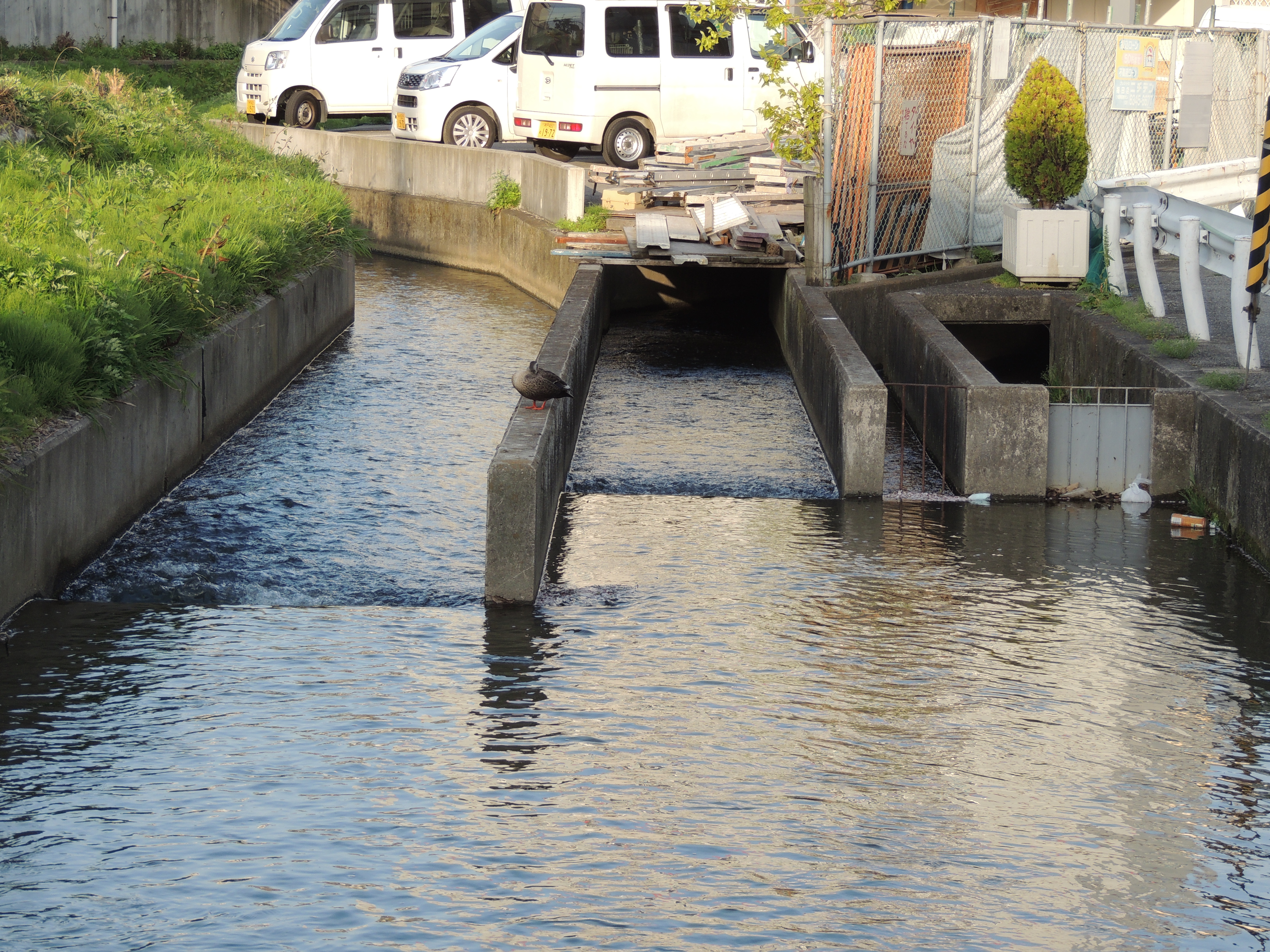 伊丹市寺本東1丁目昆陽井が４つに分水する箇所 Nikon Coolpix P510